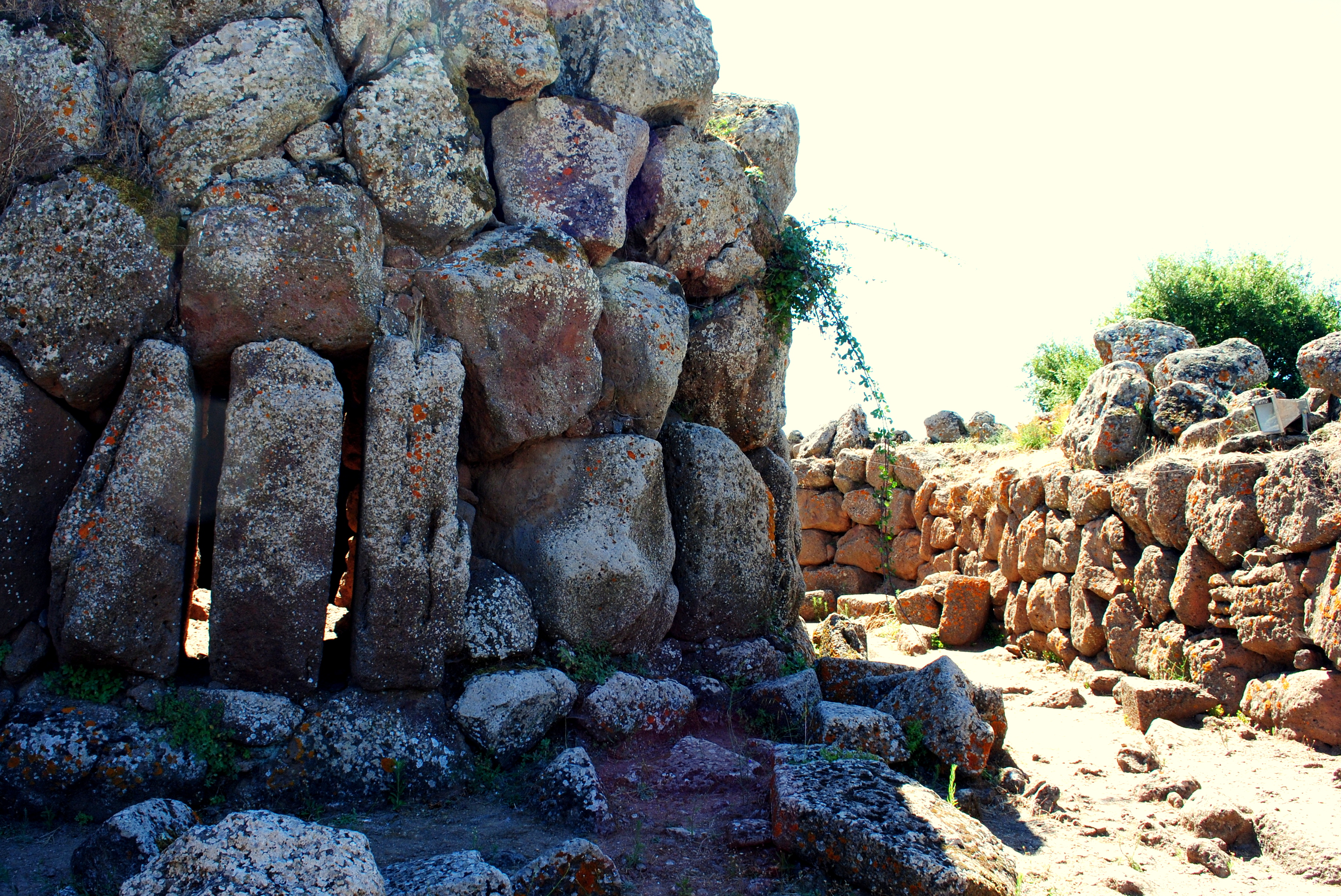 Nuraghe Arrubiu comune di Orroli (CA) This is a photo of a monument which is part of cultural heritage of Italy.